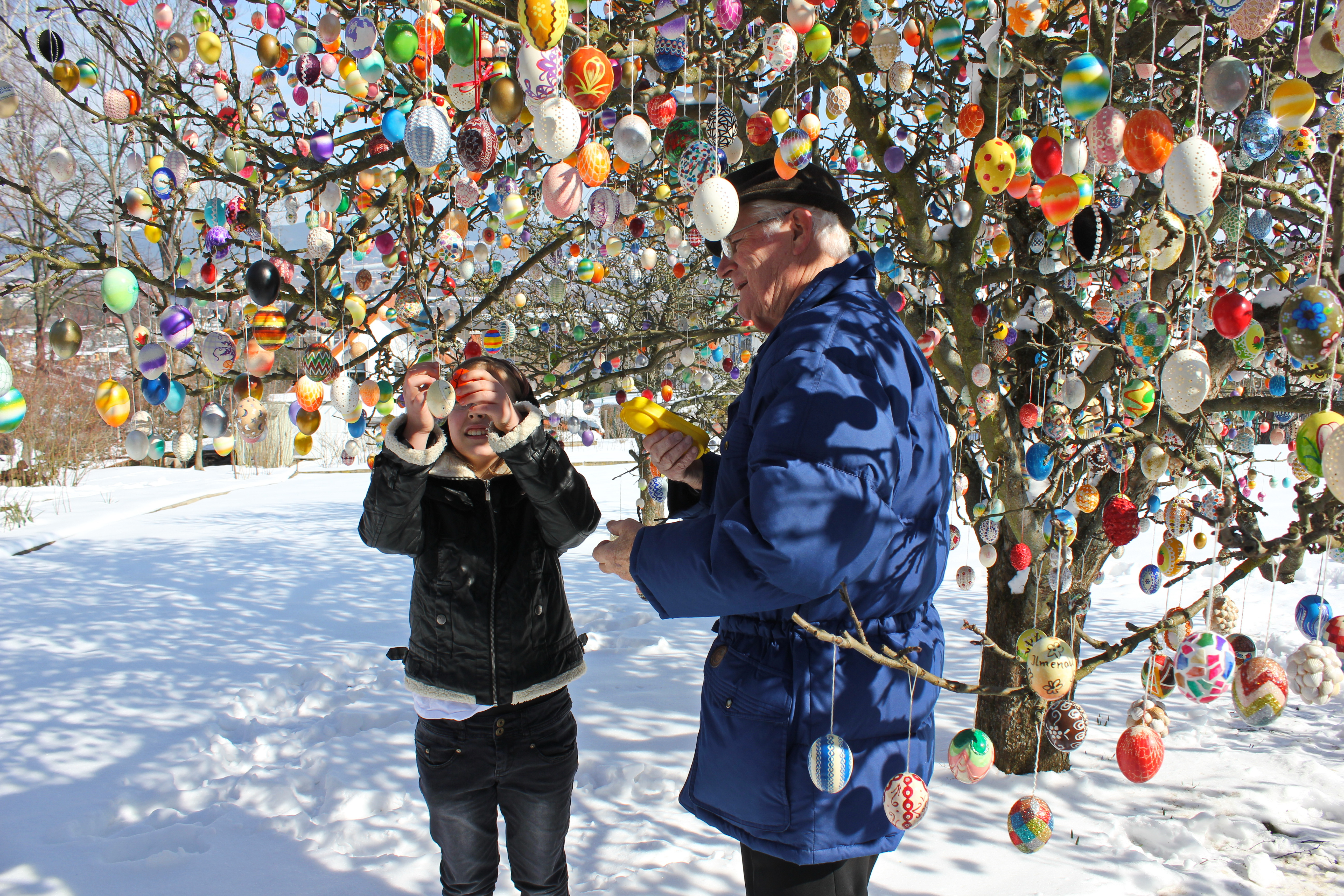 Am Ostereierbaum mit dem Herr Kraft in Saalfeld: wurde geschmückt von 1965 - 2015. Deutschland. This photo has been taken in the country: Germany